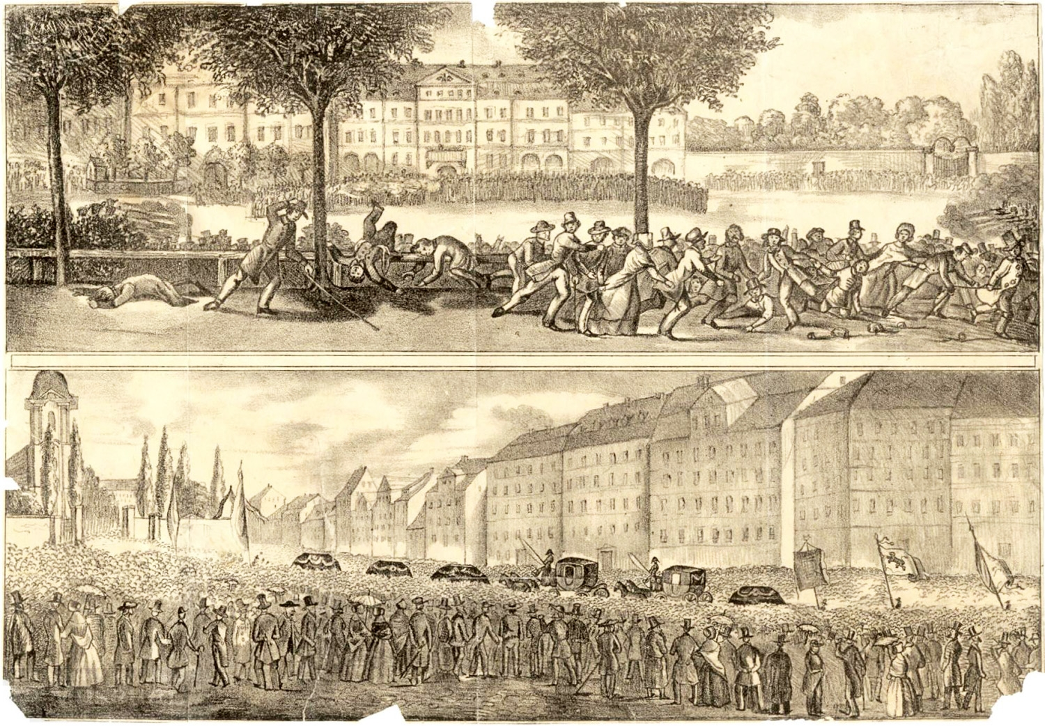 Zeitgenössische Lithografie der Vorgänge auf dem Leipziger Roßplatz vor dem Hotel de Prusse am 12. August 1845 (Leipziger Gemetzel, oben) und des Trauerzuges der Getöteten zur Johanniskirche.